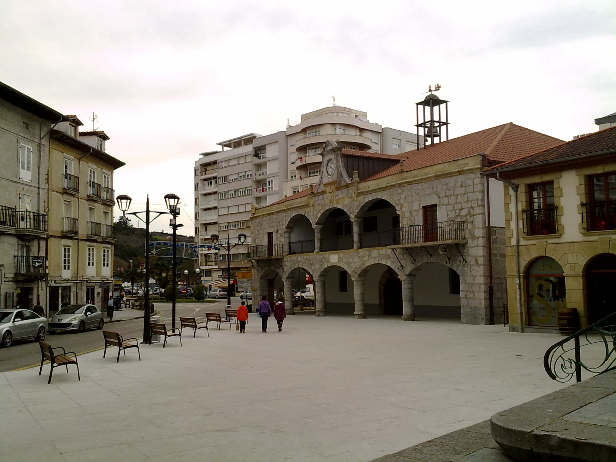 Antiguo ayuntamiento de Laredo. Del siglo XVII, notable ejemplo de arquitectura de Corporaciones, compuesto de dos pisos con arcos de piedra de sillería.